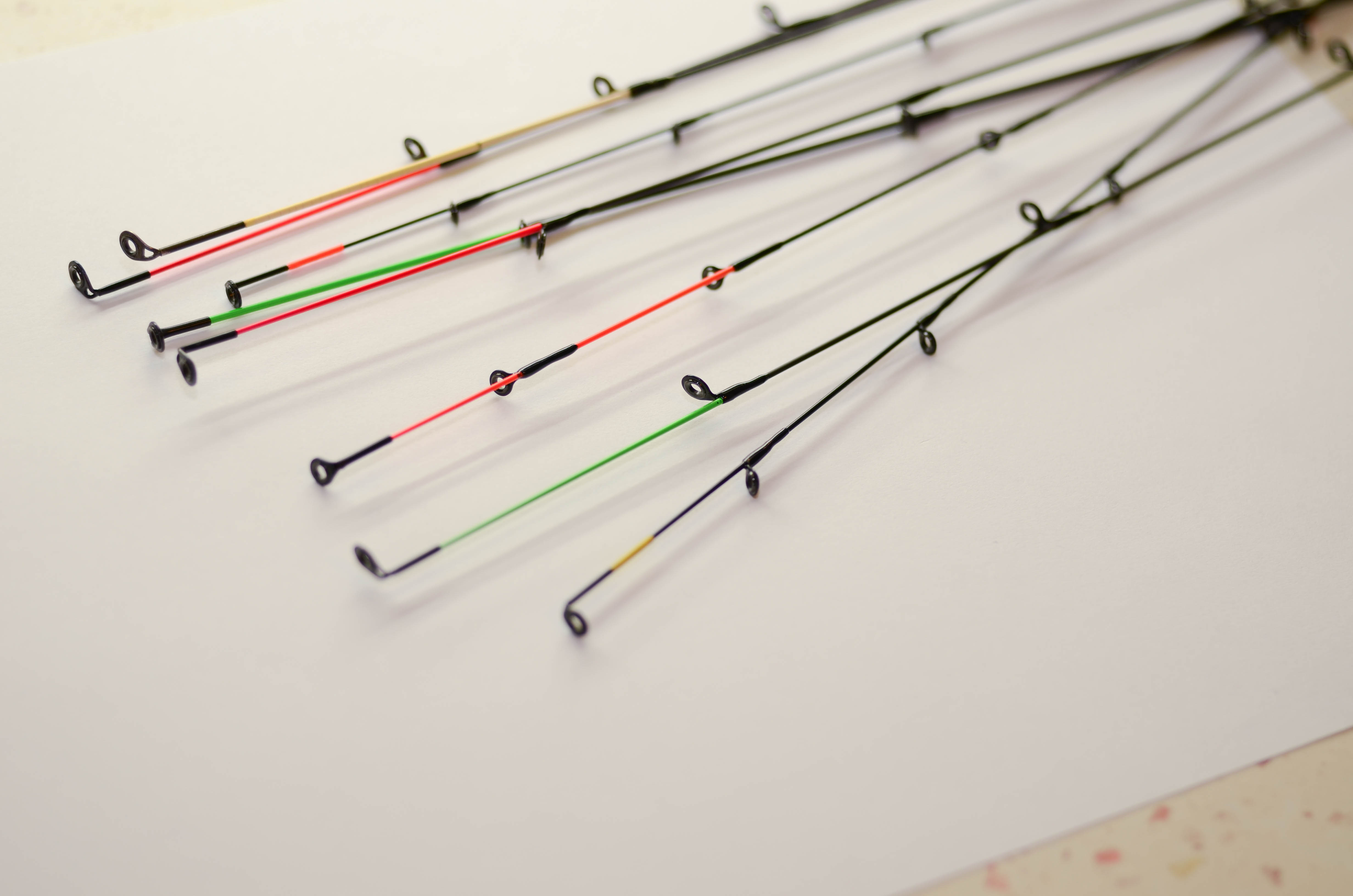 varfuri de lasnete de pescuit feeder